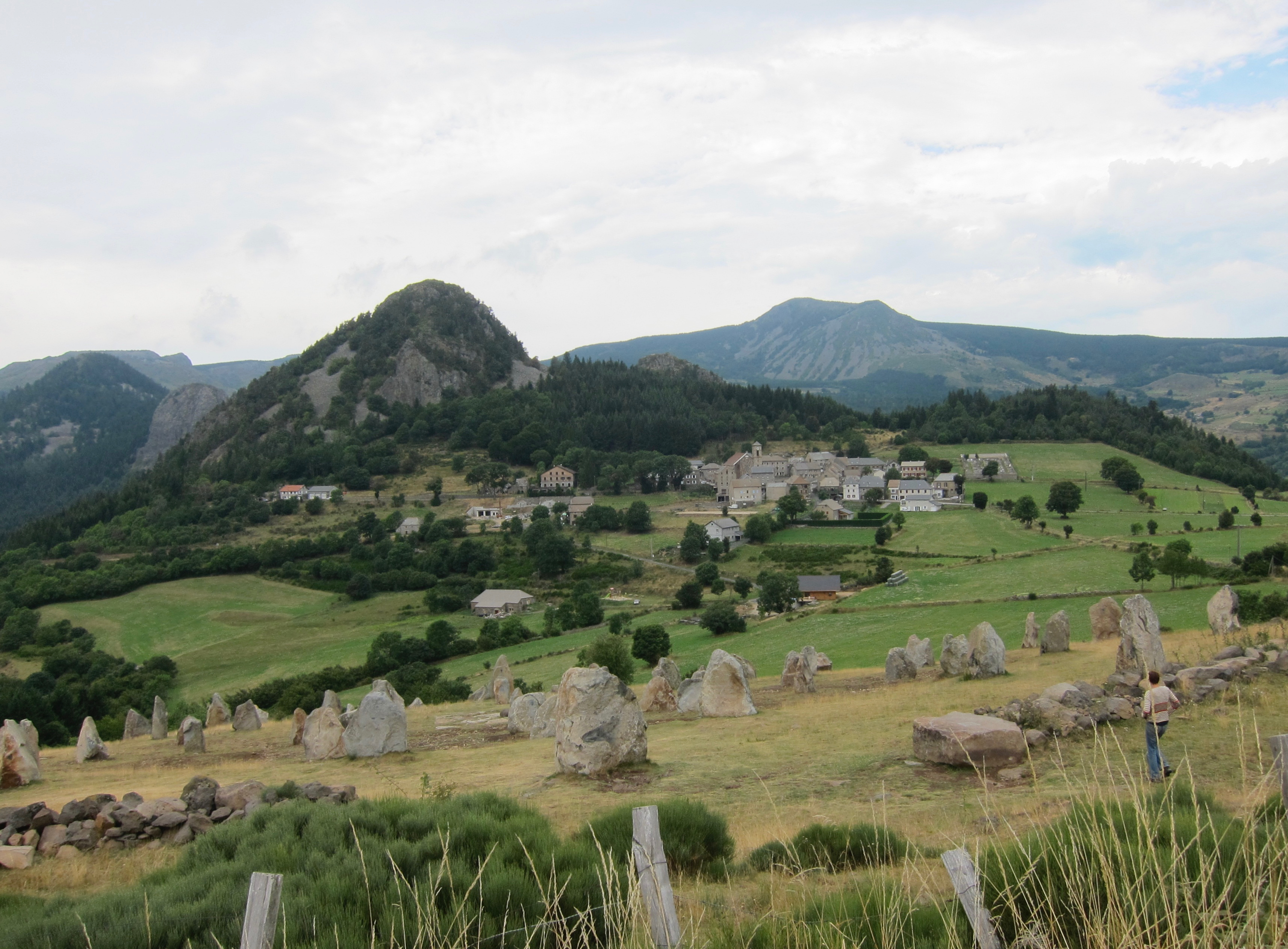 Prise de vue direction Ouest Nord Ouest, mégalithes artistiques au premier plan.